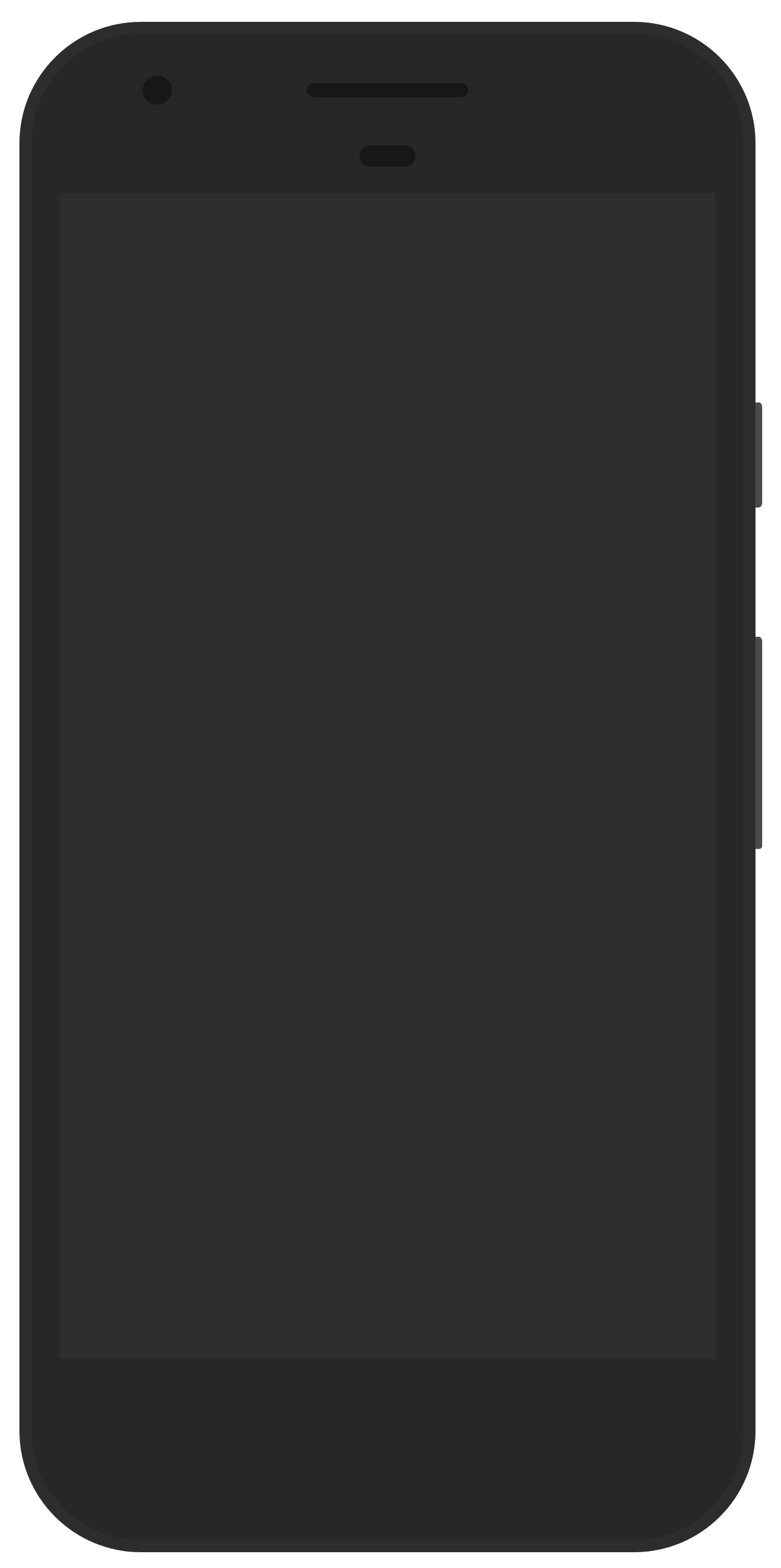 Google Pixel PSD Quite Black